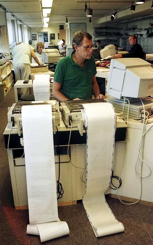 Juni 1988 Bonn, Nachrichtenagentur Reuters